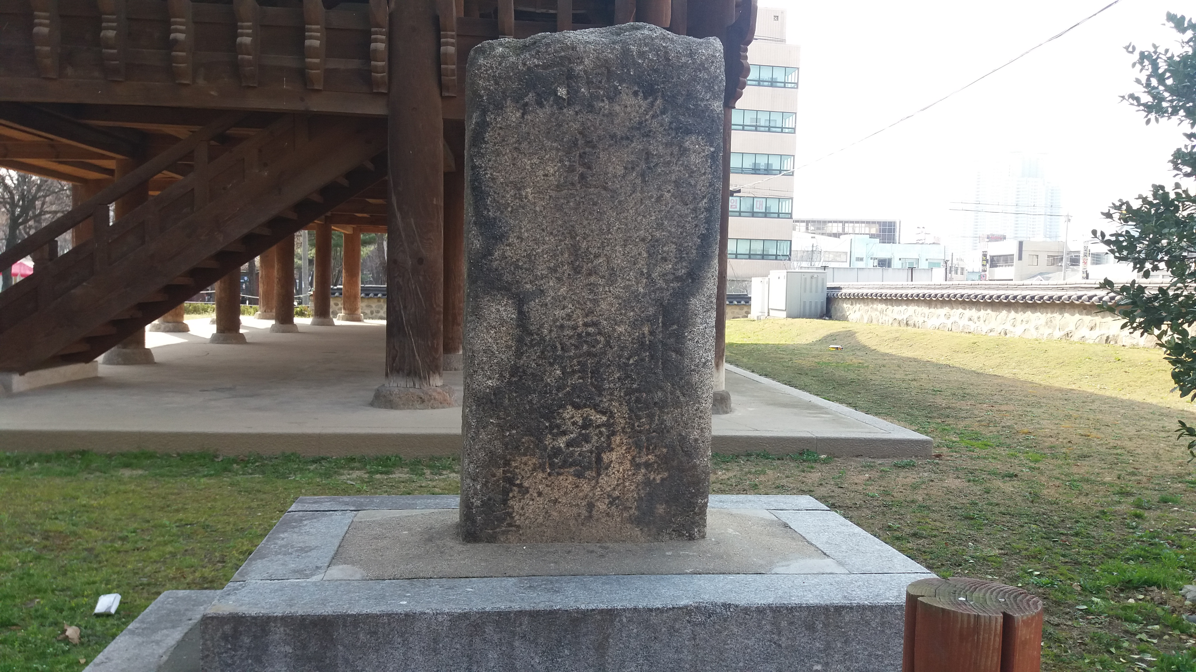 청주 척화비